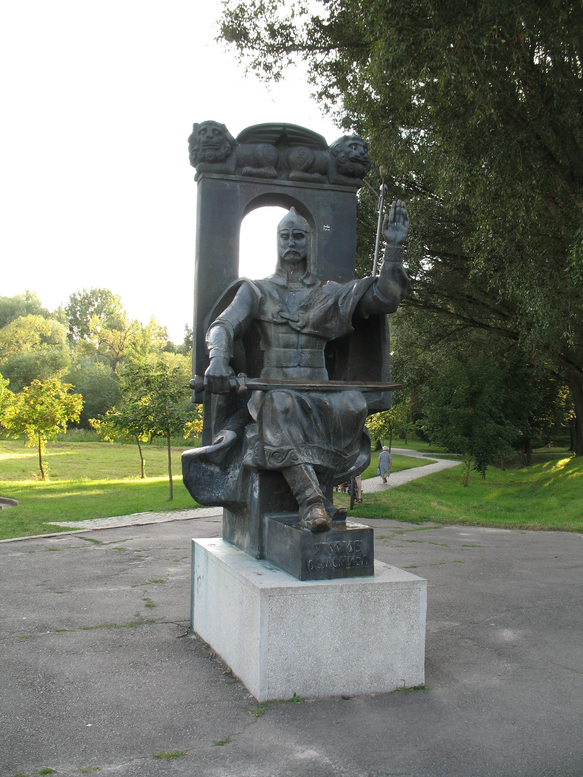 Володимир-Волинський. Памятник Ярославу Осмомислу.